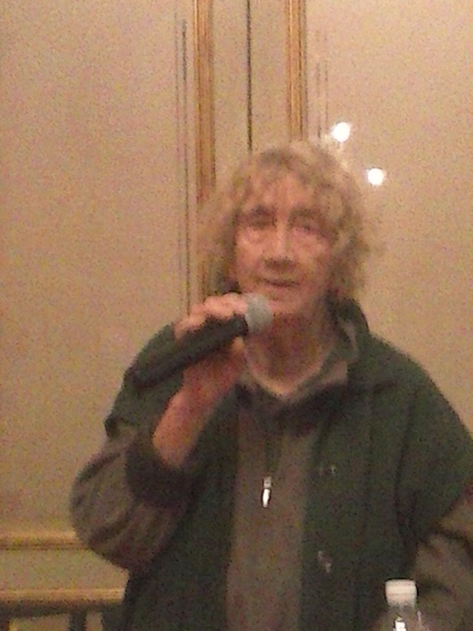 Lorenza Mazzetti a Perugia il 19 dicembre 2014